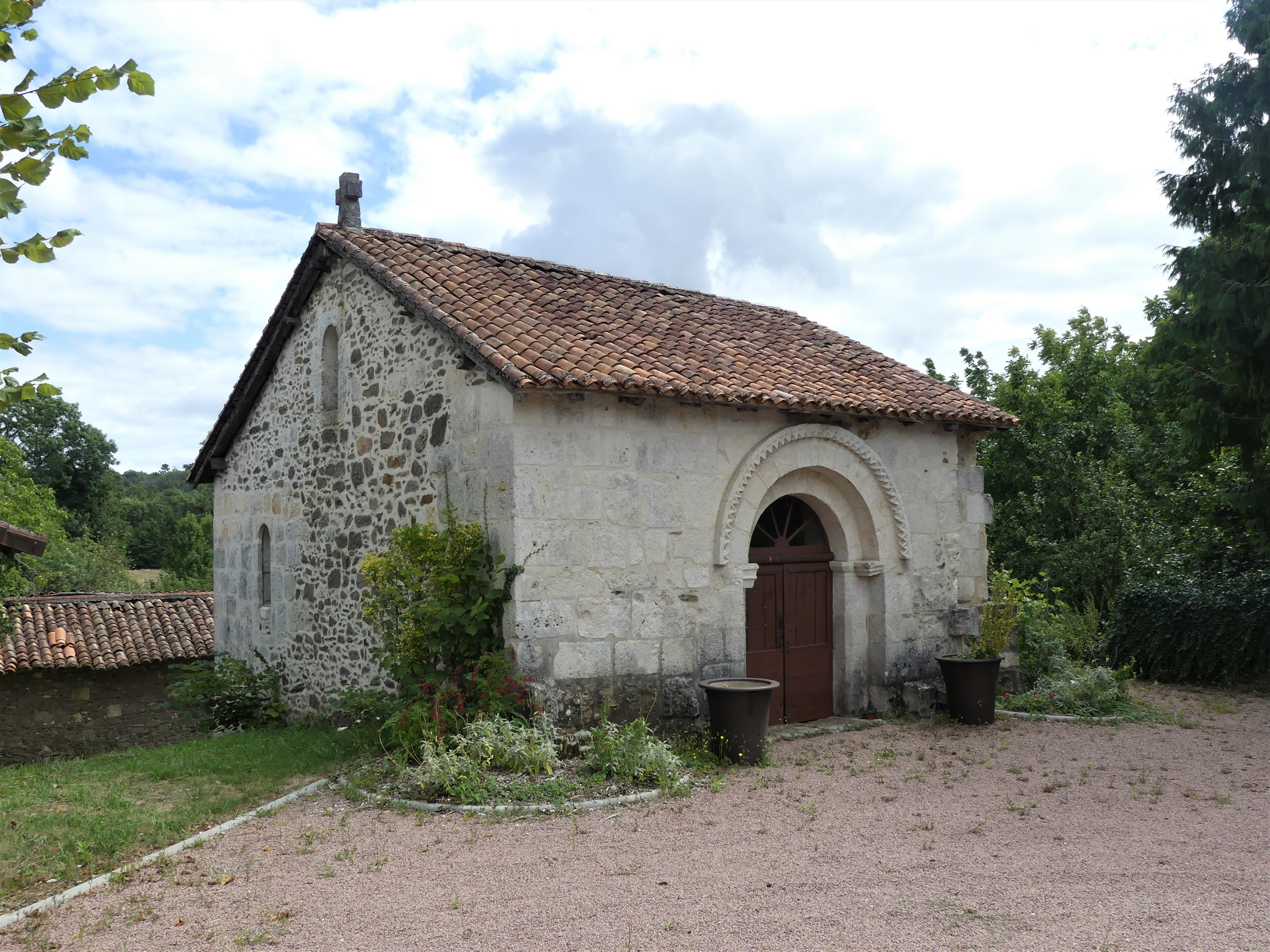 La chapelle du prieuré Saint-Blaise, au lieu-dit Chantres, Milhac-de-Nontron, Dordogne, France.